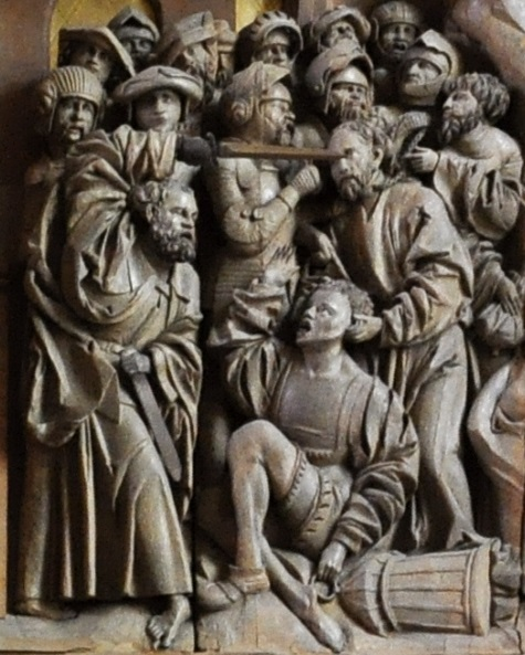 Detail des Passionsaltars in St. Magdalenen, Hildesheim: Petrus mit erhobenem Schwert, am Boden Malchus, dessen Ohr Jesus heilt